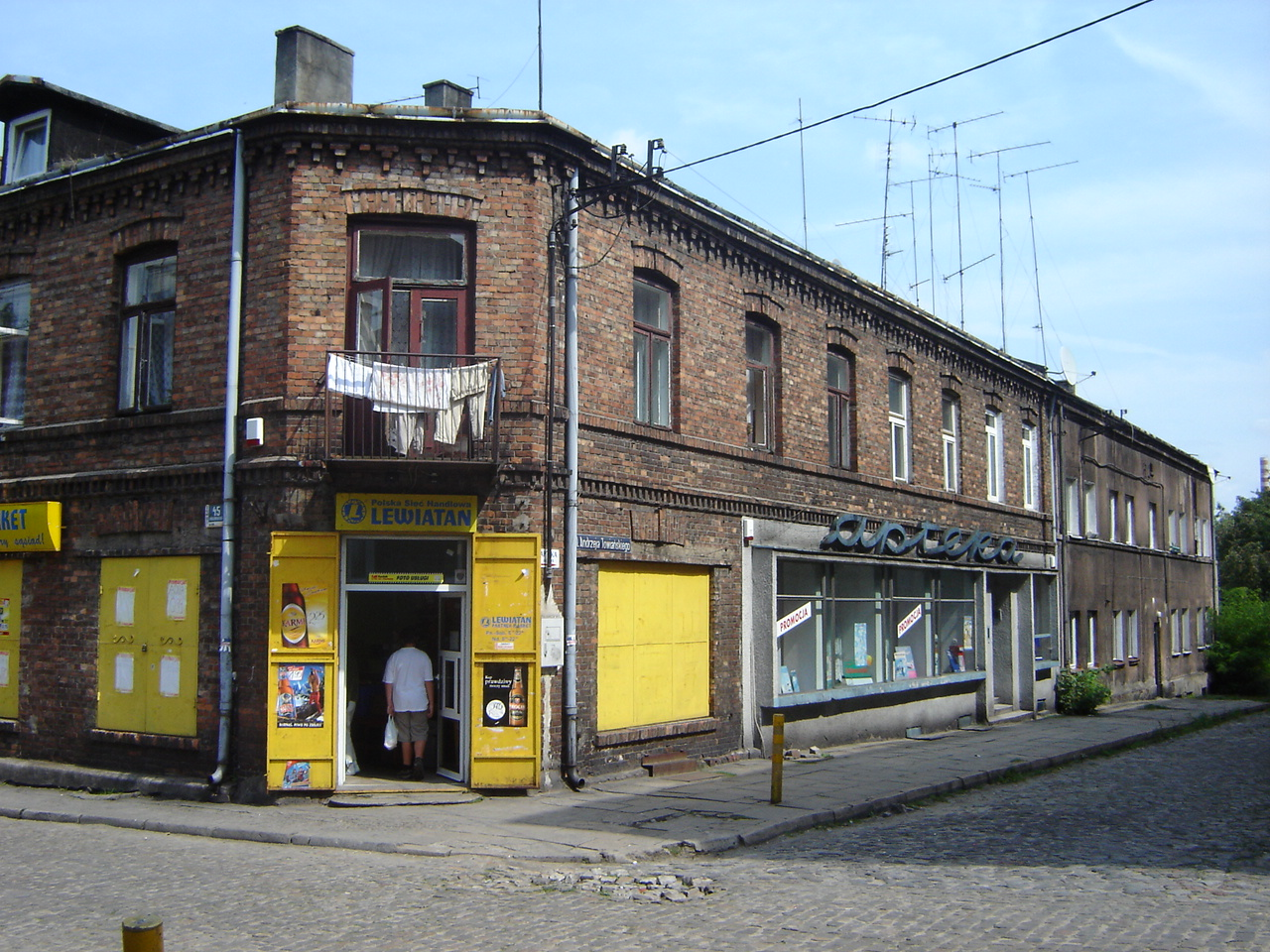 Częstochowa, ul. Towiańskiego.